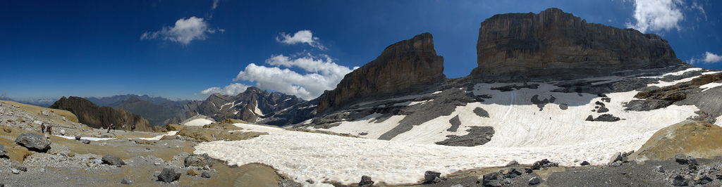 Brèche de Roland, massif du Mont-Perdu, frontière franco-espagnole.